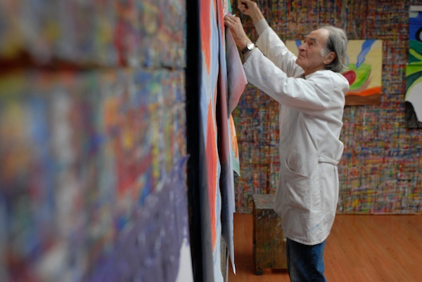 Arno Stern dans le Clos Lieu, rue Falguière à Paris, XVe arrondissement